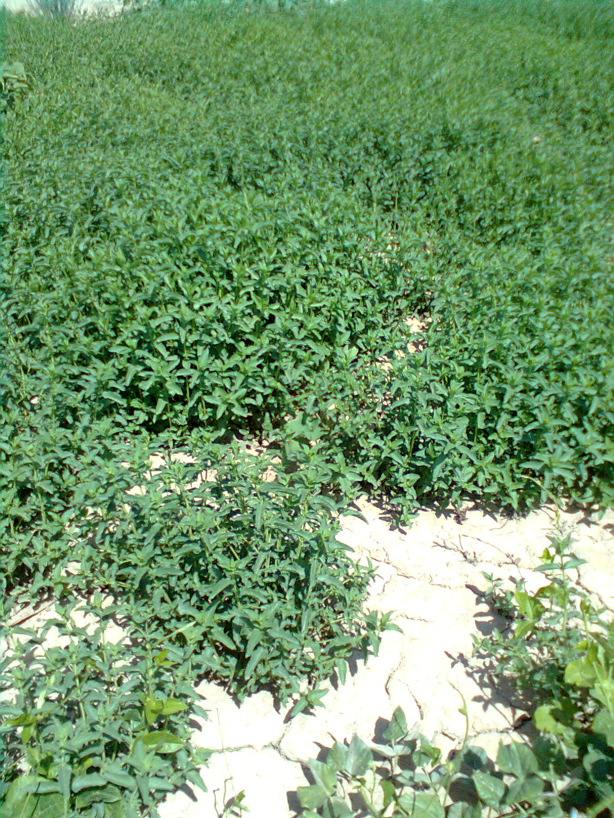 مزرعه نعناع تنگ طه